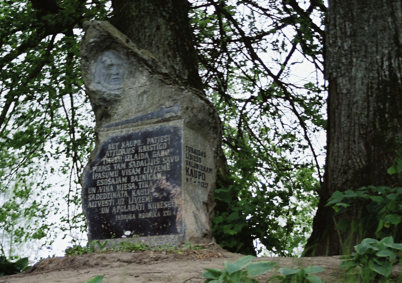 mälestuskivi Kaupo oletataval hauakohal Krimulda kiriku lähistel